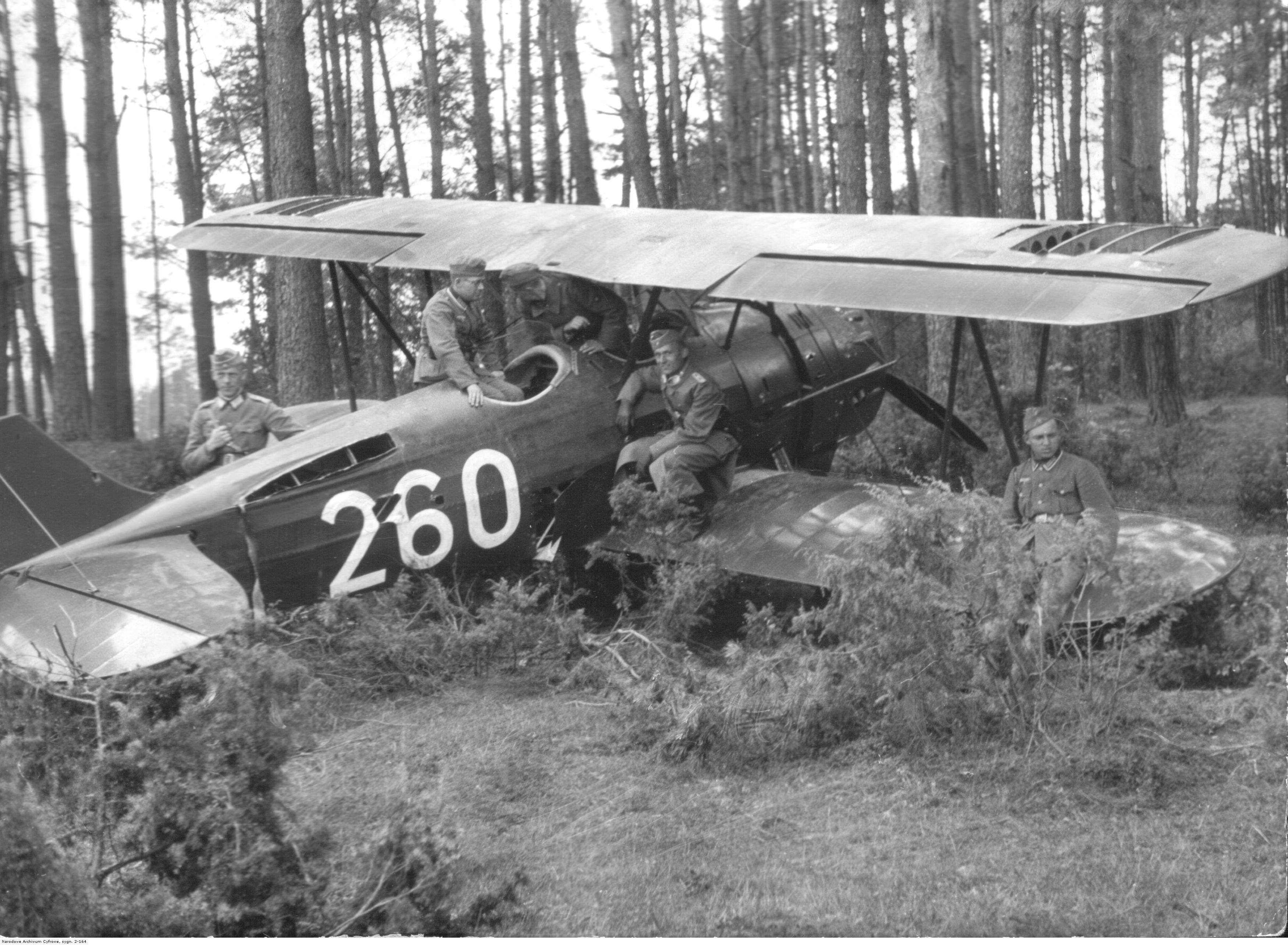 Pięciu żołnierzy niemieckich ogląda zdobyty polski samolot szkoleniowy PWS-26.